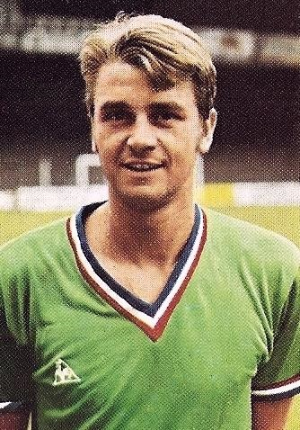 Aimé Jacquet en 1970 (Saint-Étienne), 'Ageducatifs 1970 - 1971', Panini figurina.